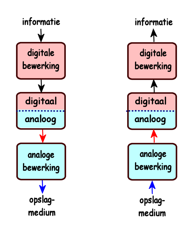 Gelaagde structuur digitale opslag